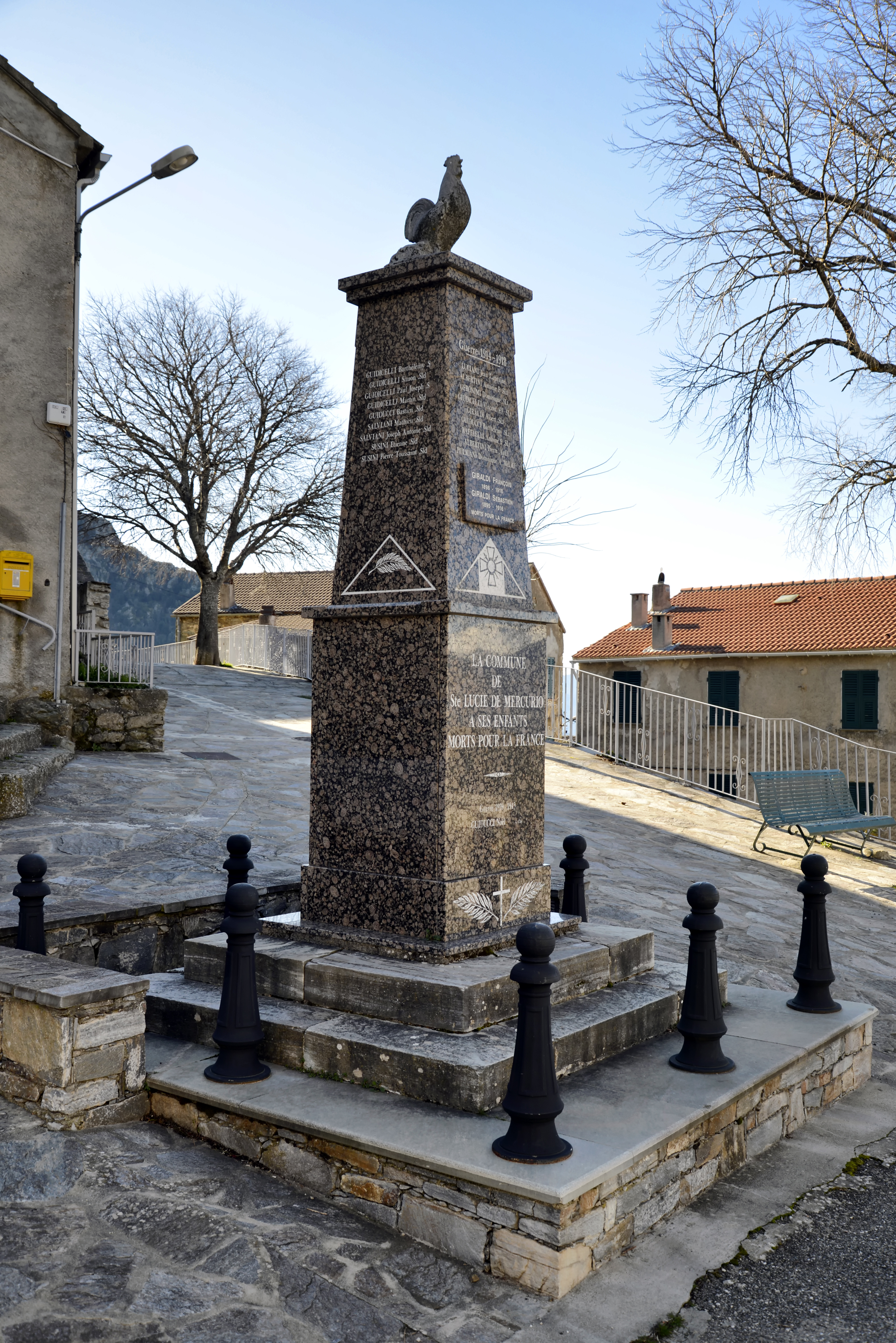 Santa-Lucia-di-Mercurio, Bozio (Haute-Corse) - Monument aux morts, place de l'église.